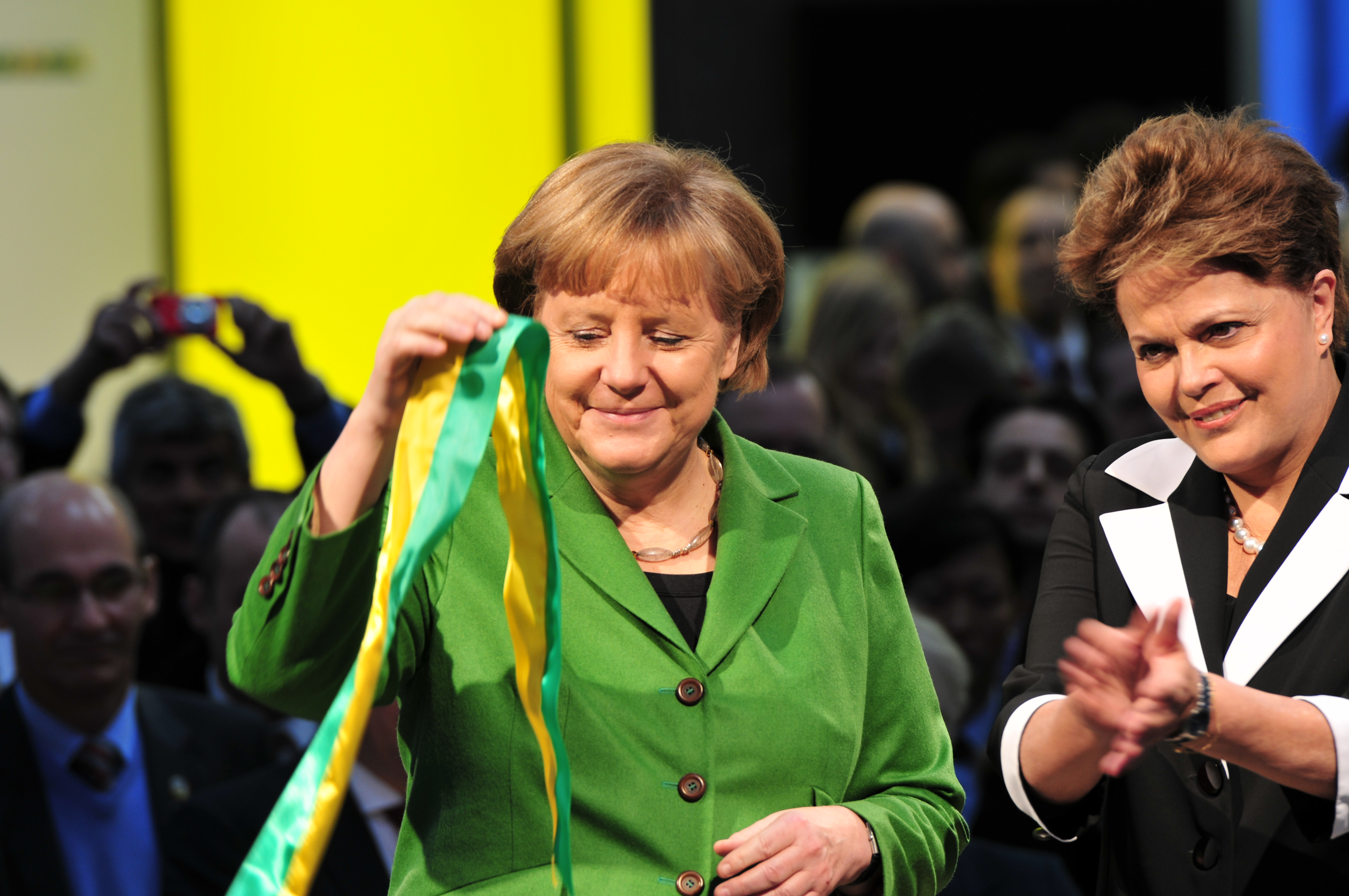 Angela Merkel bei der Eröffnung der CeBIT 2012 CeBIT 20126. bis 11. März in Hannover Dieses Foto wurde durch die Unterstützung von Wikimedia Österreich und die Twoonix Software GmbH ermöglicht.